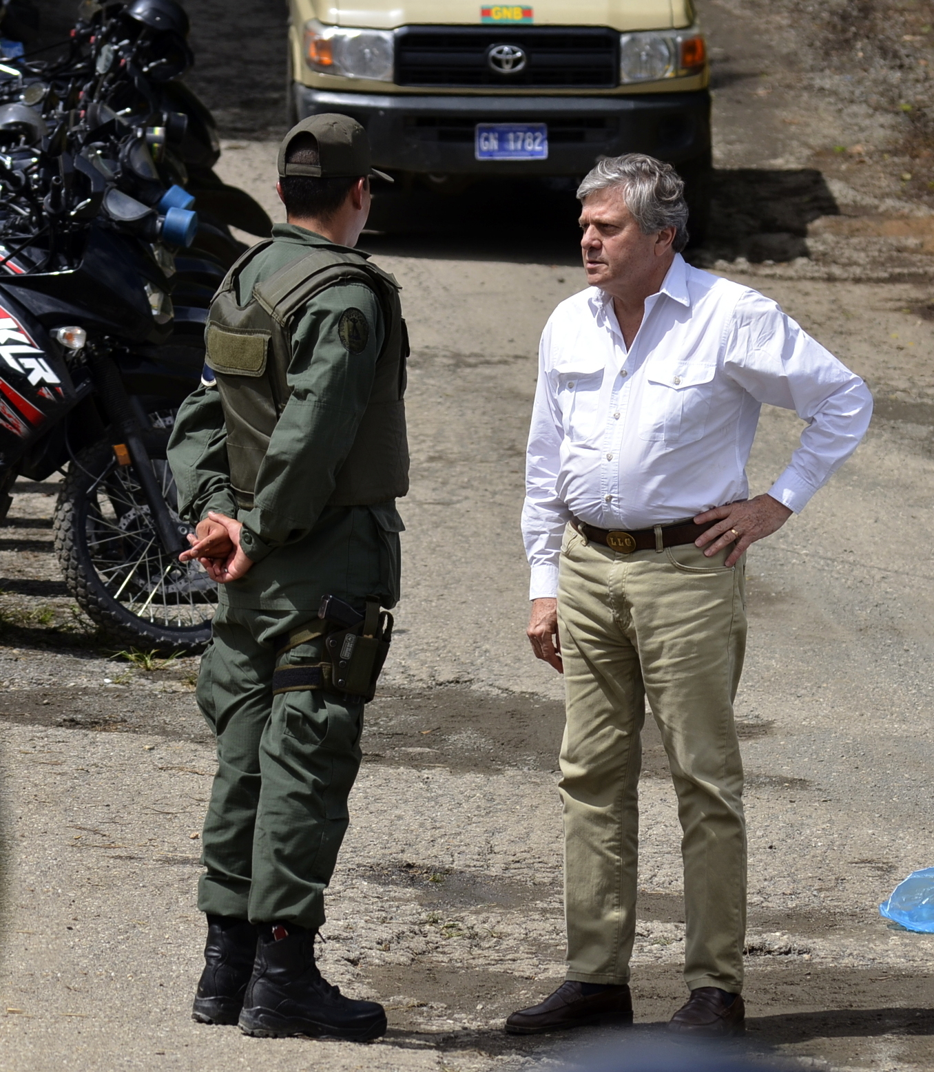 Ya de salida, padre de Leopoldo López conversa con uno de los oficiales de la GNB a cargo del dispositivo anti-motín a la entrada de la prisión de Ramo Verde